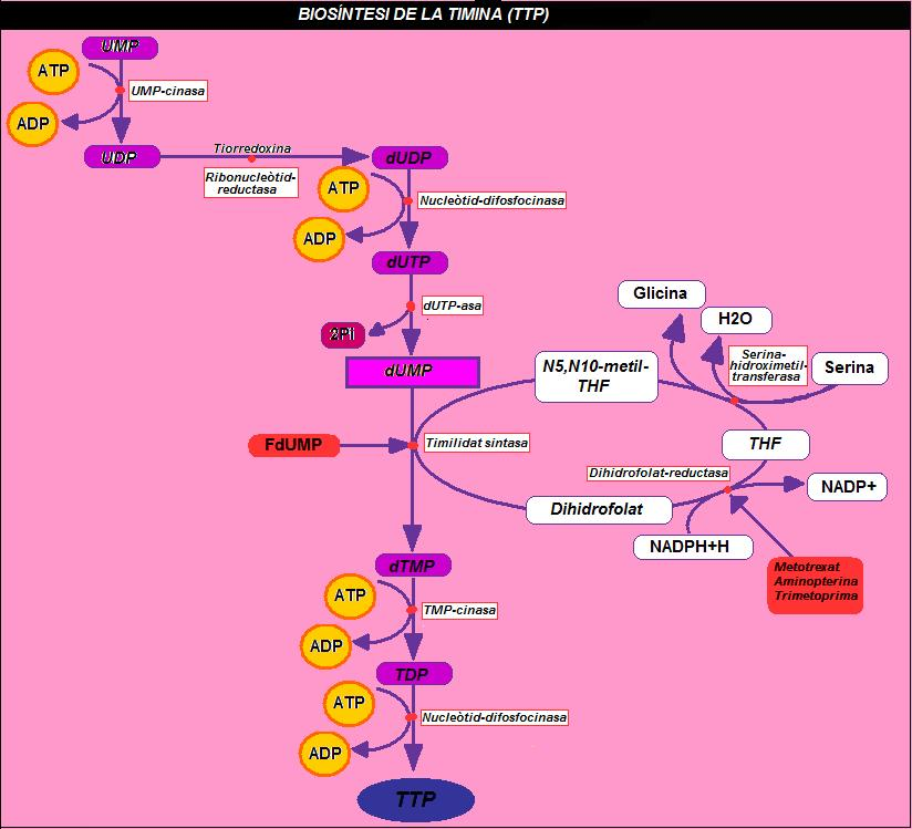 Biosintesi de la timina